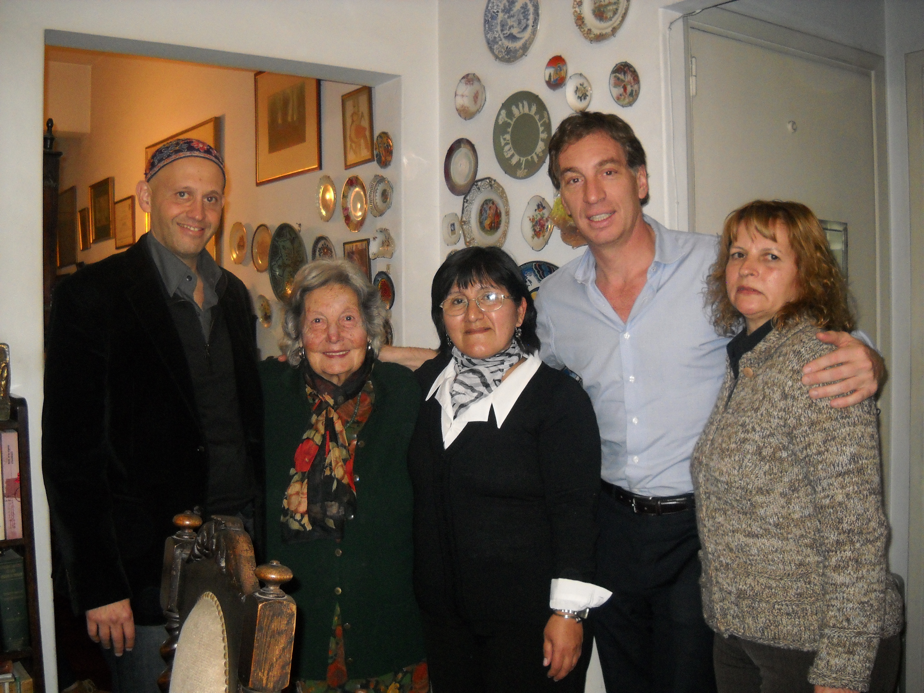 Lily Sosa de Newton fue declarada “Mayor destacada” por la Legislatura de la Ciudad Autónoma de Buenos Aires en el año 2012, recibido del Sr. Diego Santilli y del Rabino Sergio Bergman, en su casa. La acompaña su acompañante terapéutica.